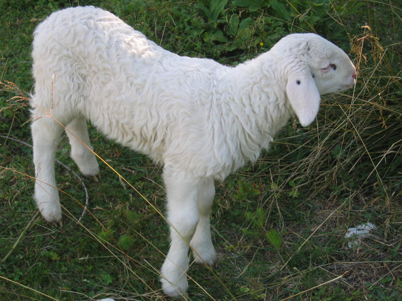 Jagnje.